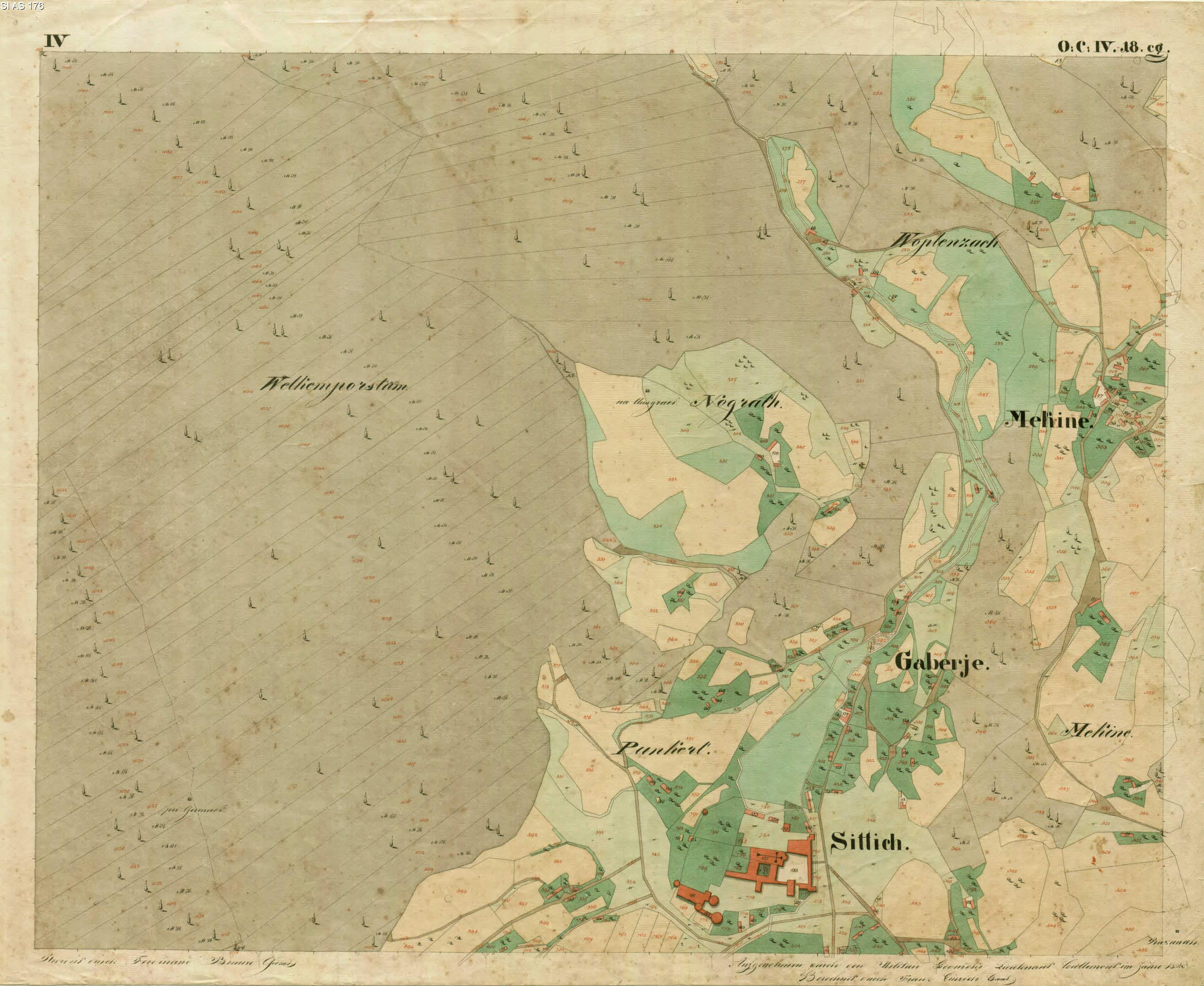 Stična na francisejskem katastru za Kranjsko iz leta 1825